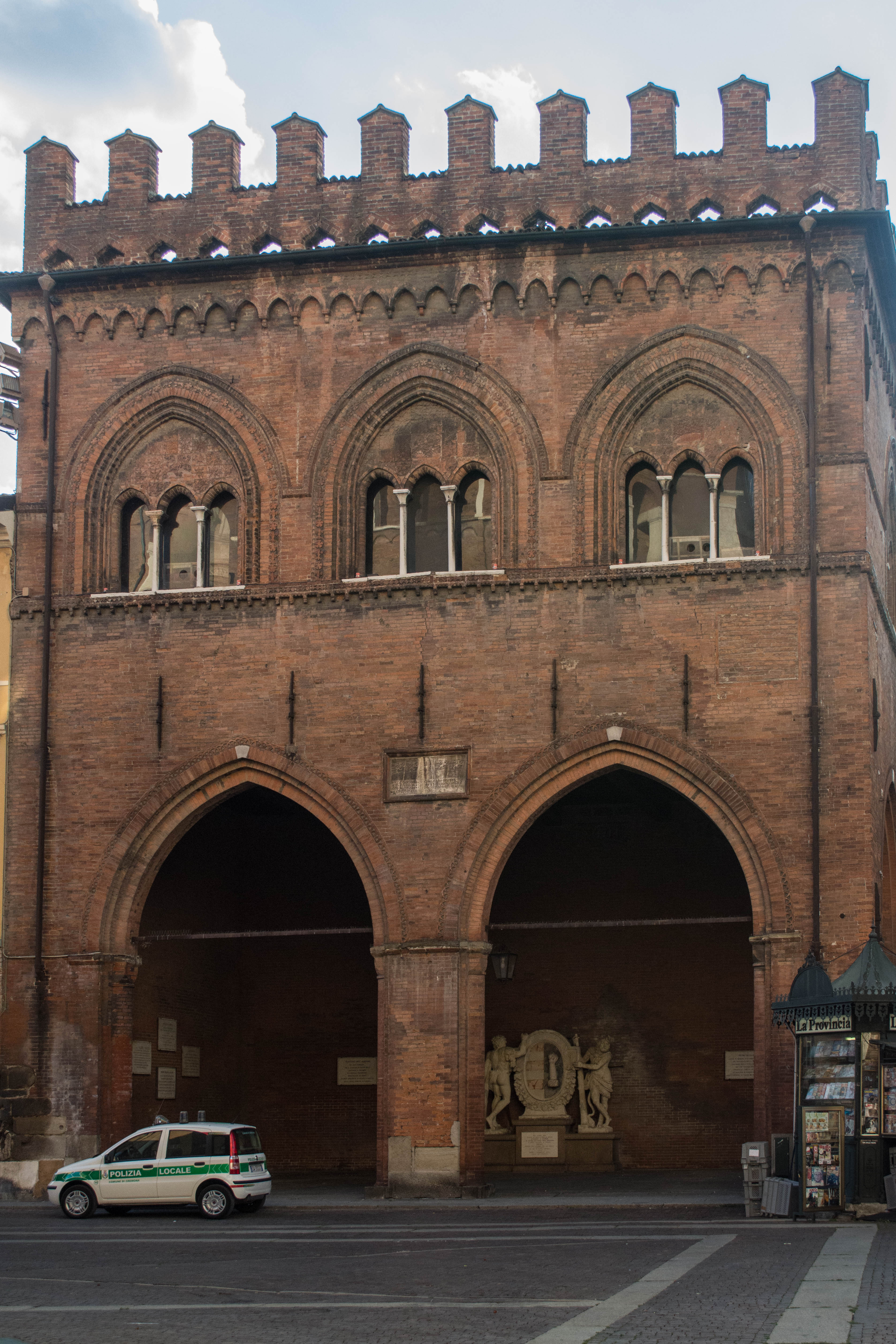 Loggia dei Militi This is a photo of a monument which is part of cultural heritage of Italy.